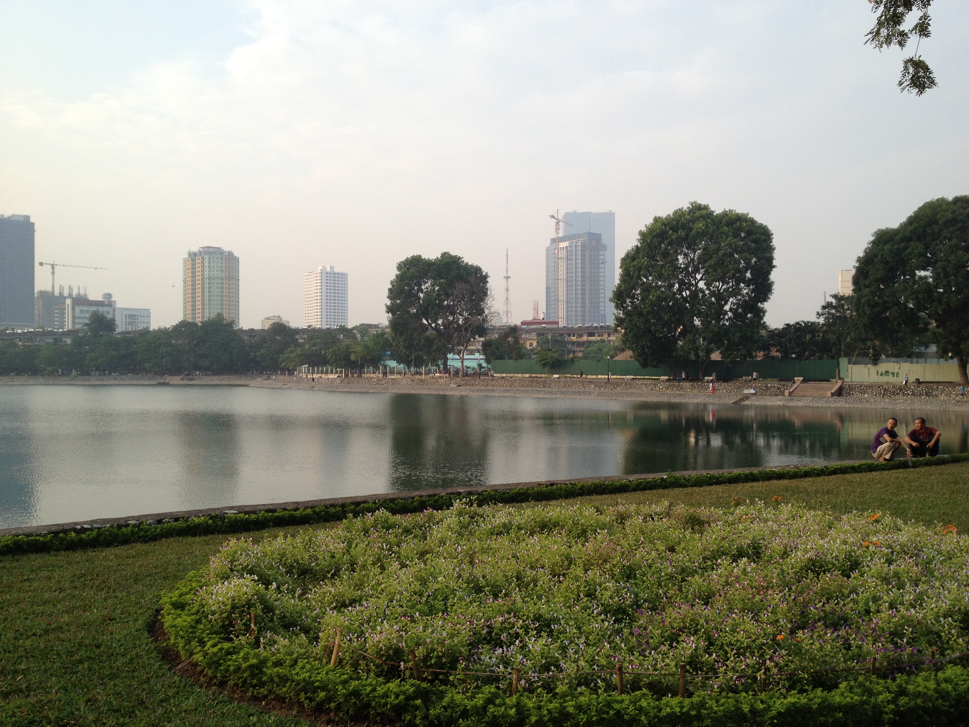 Công viên Indira Gandhi, Hà Nội, Việt Nam.